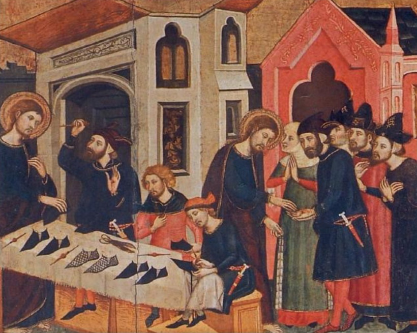 Retaule de Sant Marc i Sant Anià, obra d'Arnau Bassa (1346). Actualment a la Seu de Manresa. Taula de l'encontre de Sant Marc amb Sant Anià, al pis central del carrer esquerre